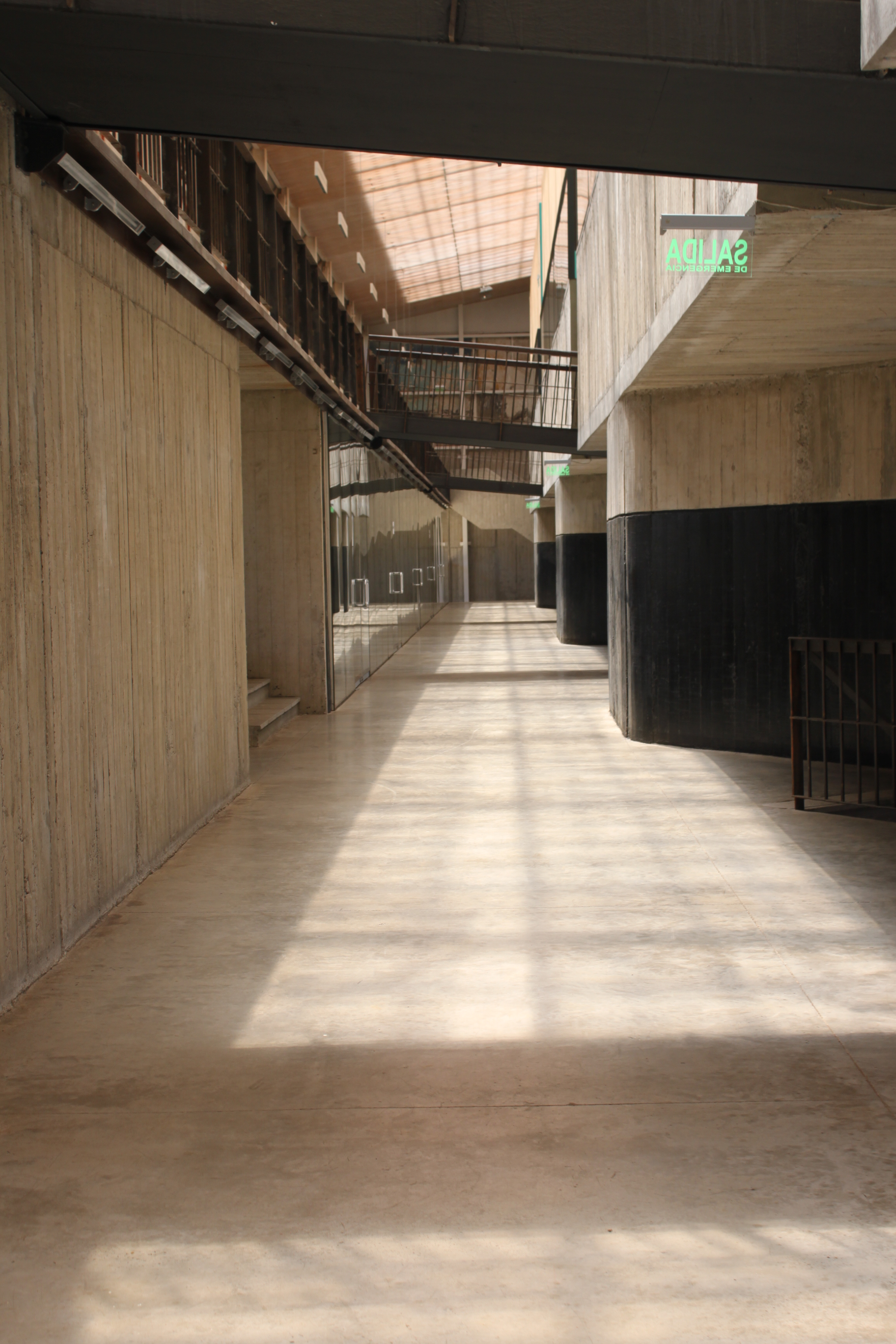 Vista edificio Centro Cultural Parque Cultural Valparaíso, Chile.